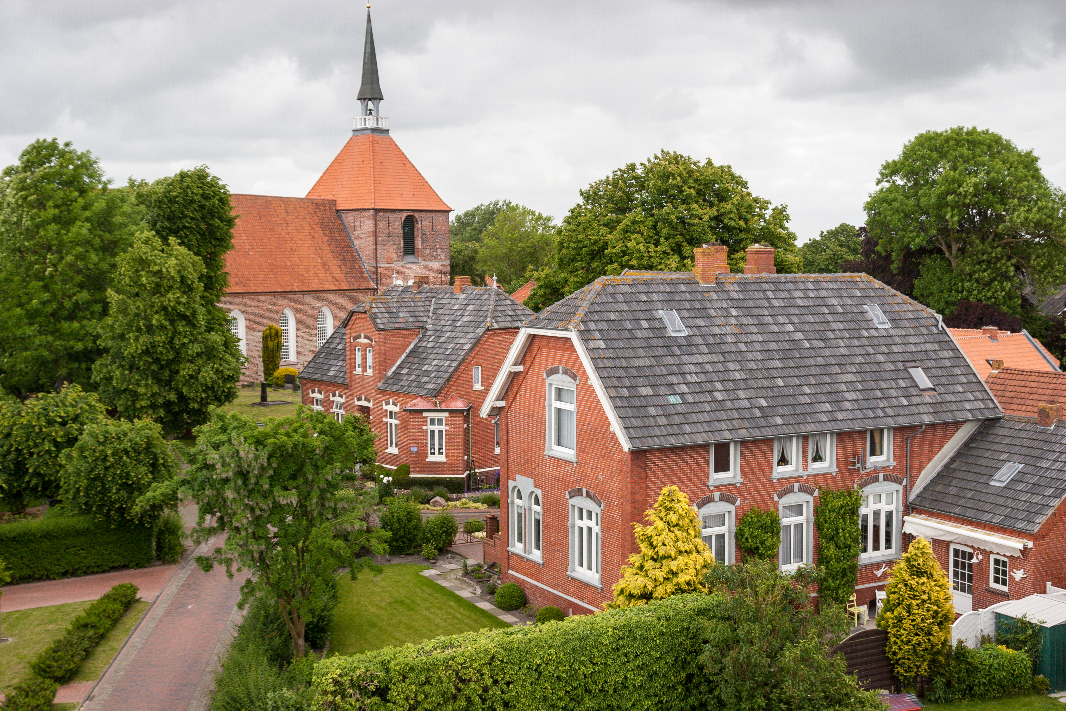 Warftendorf Rysum (Ostfriesland)